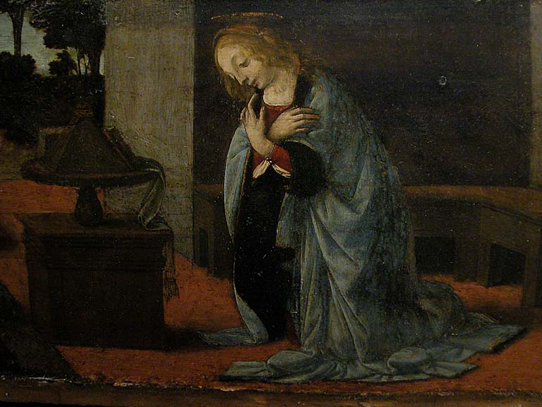 Lorenzo di Credi o Leonardo da Vinci, Annuncciation n. 598, Louvre, Paris